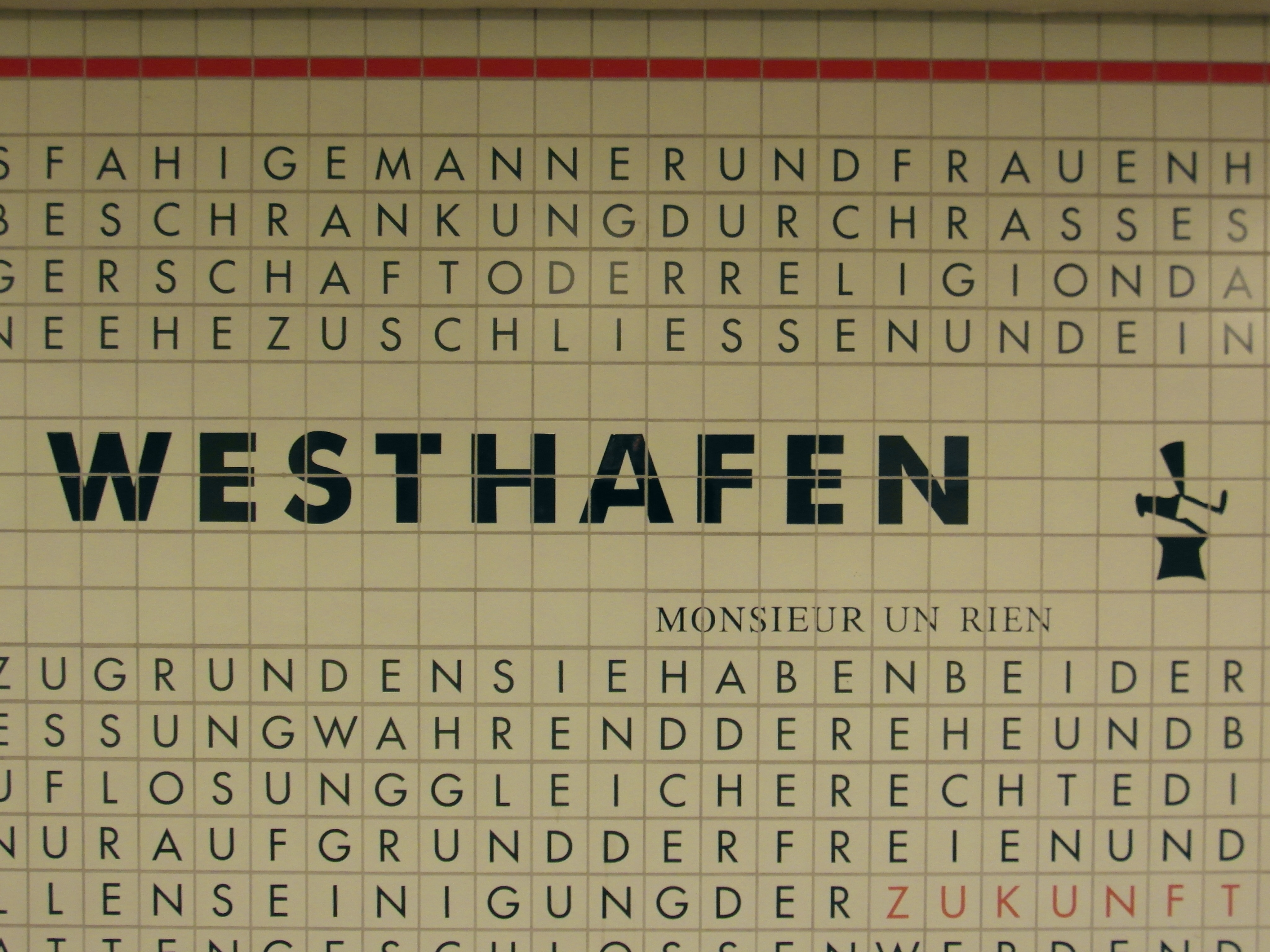 Berlin - U-Bahnhof Westhafen - Linie U9